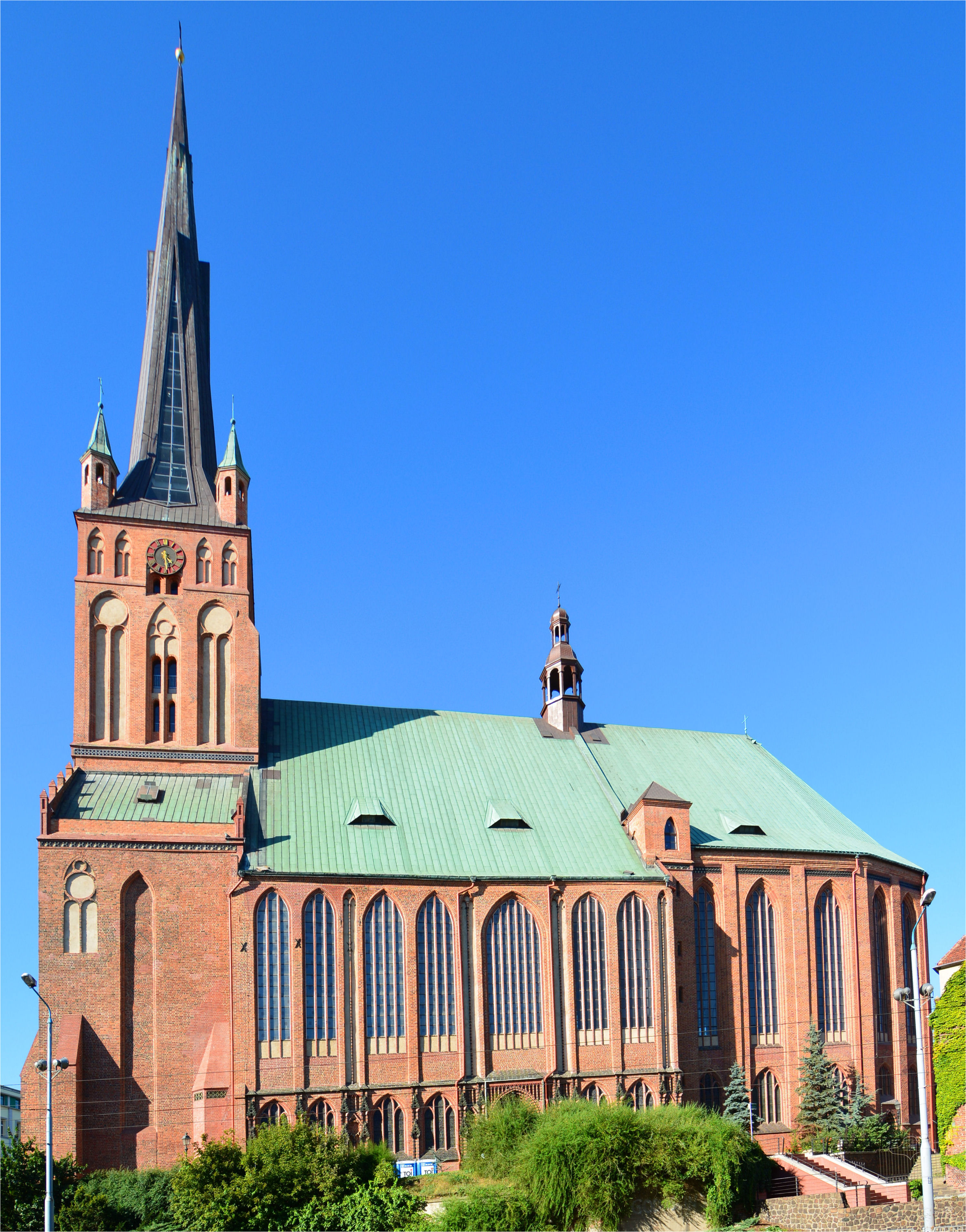 Szczecin, kościół par., ob. archikatedra p.w. św. Jakuba, XII/XIII, 1375-1387, XV, 1972-1982